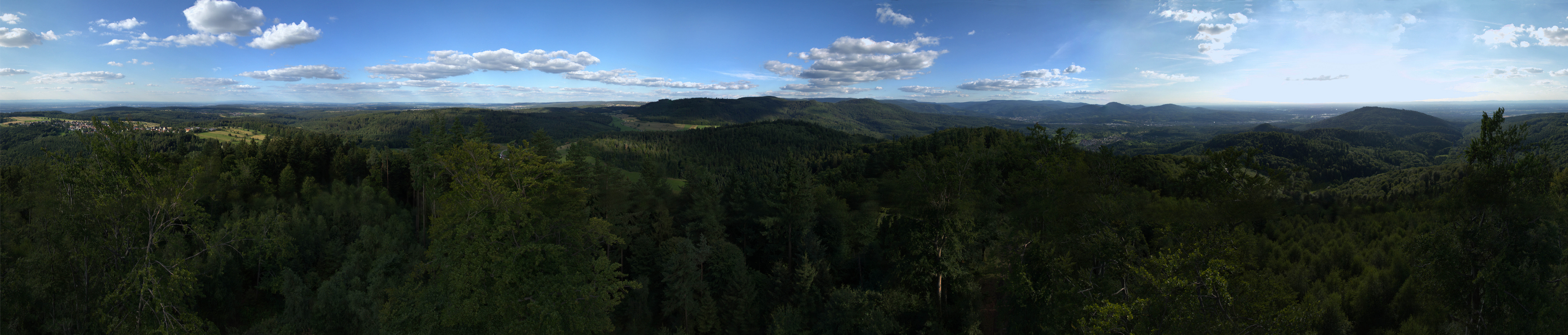 Panorama des Mahlbergs bei Gaggenau